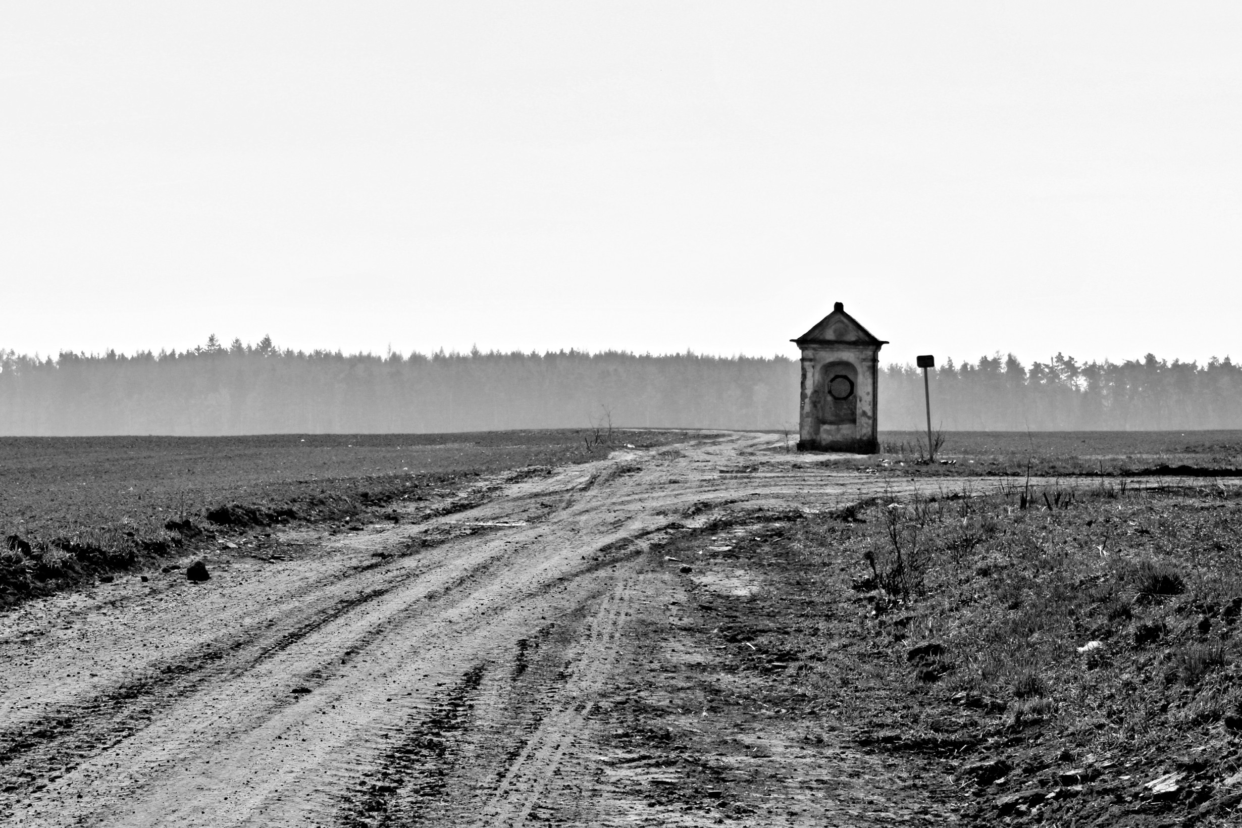 Čistá, Boží muka u cesty